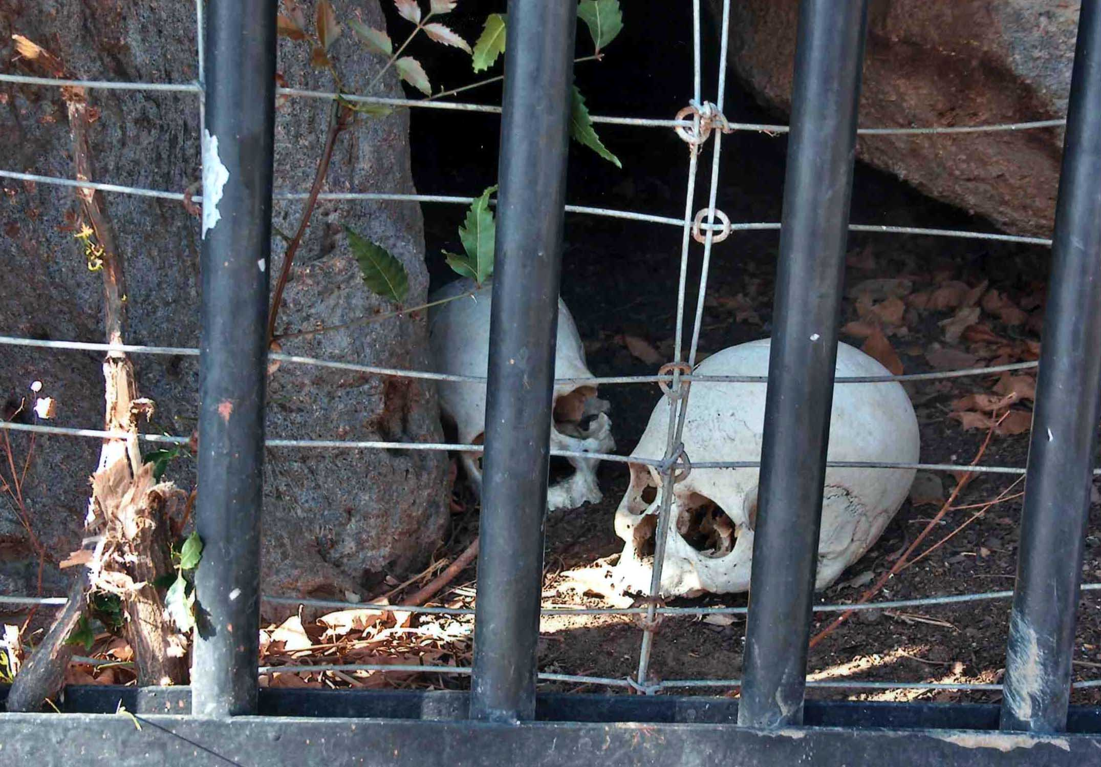 Crânes de griots dans un baobab sacré à la Réserve de Bandia au Sénégal